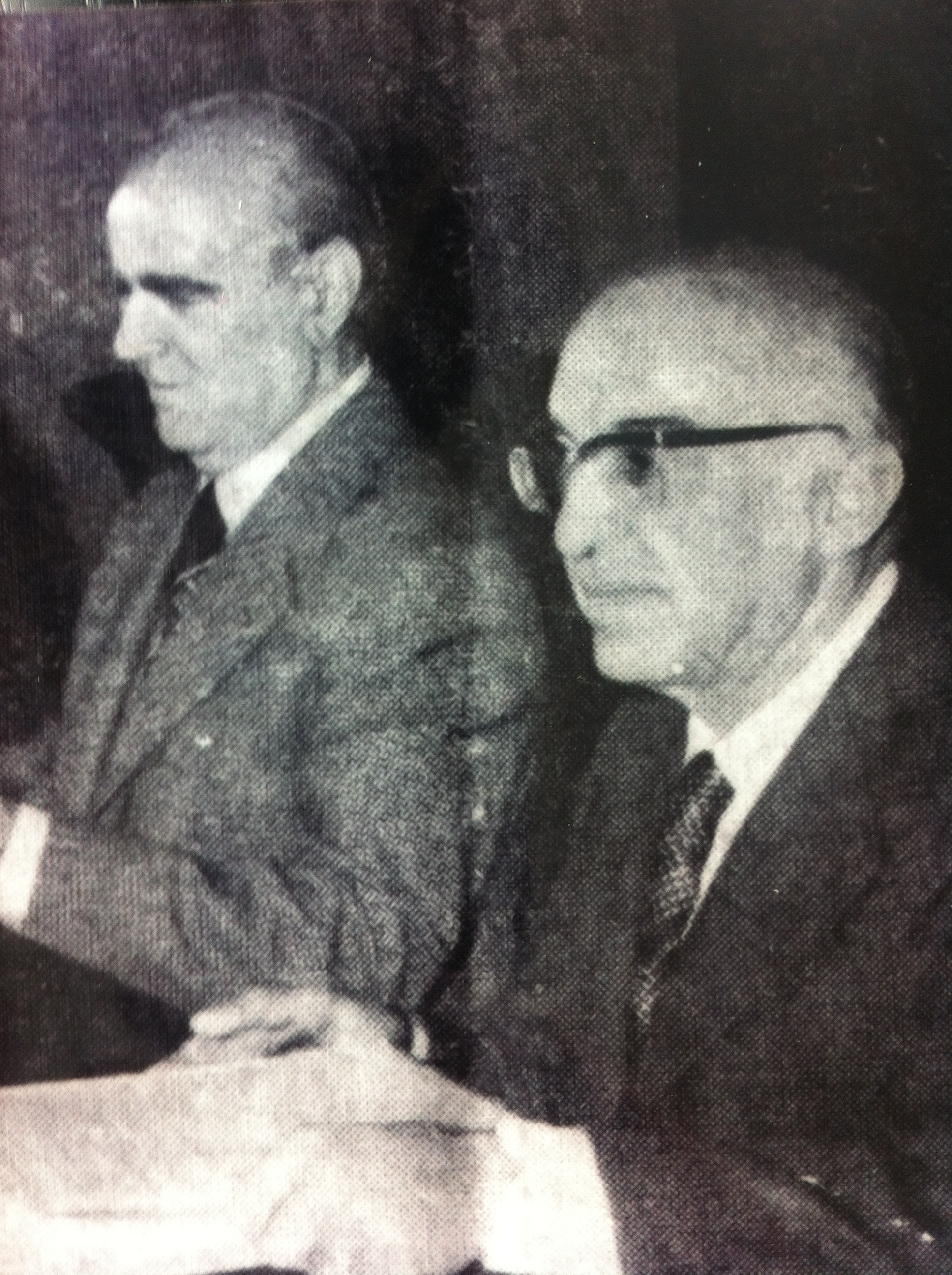 Mvskoke: Ο Πρωθυπουργός Κων. Καραμανλής με τον Γιώργιο Δασκαλάκη